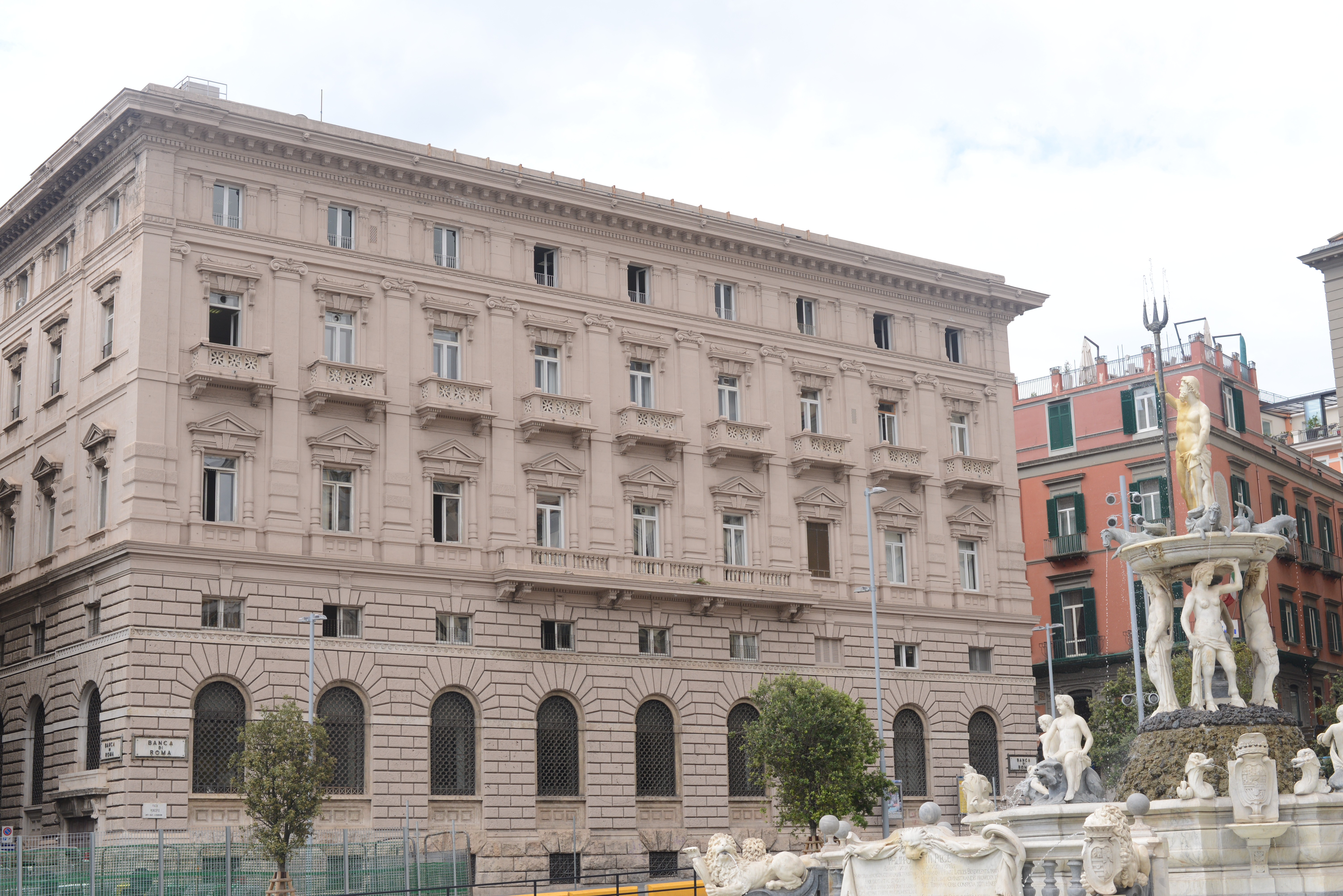 Palazzo della Banca di Roma, facciata su piazza Municipio. Fontana sulla piazza.